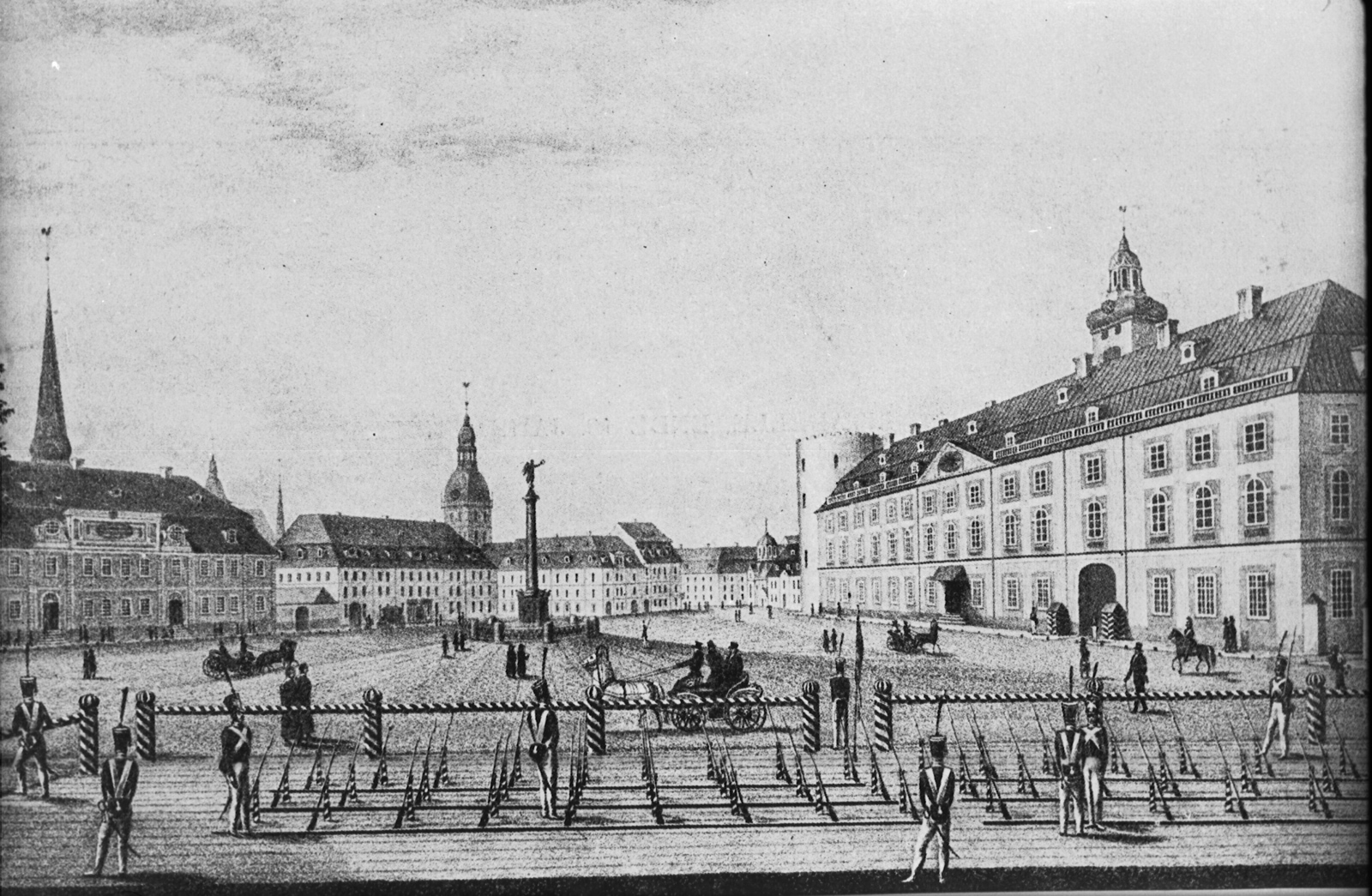 Riga, Lyzeum, 1820